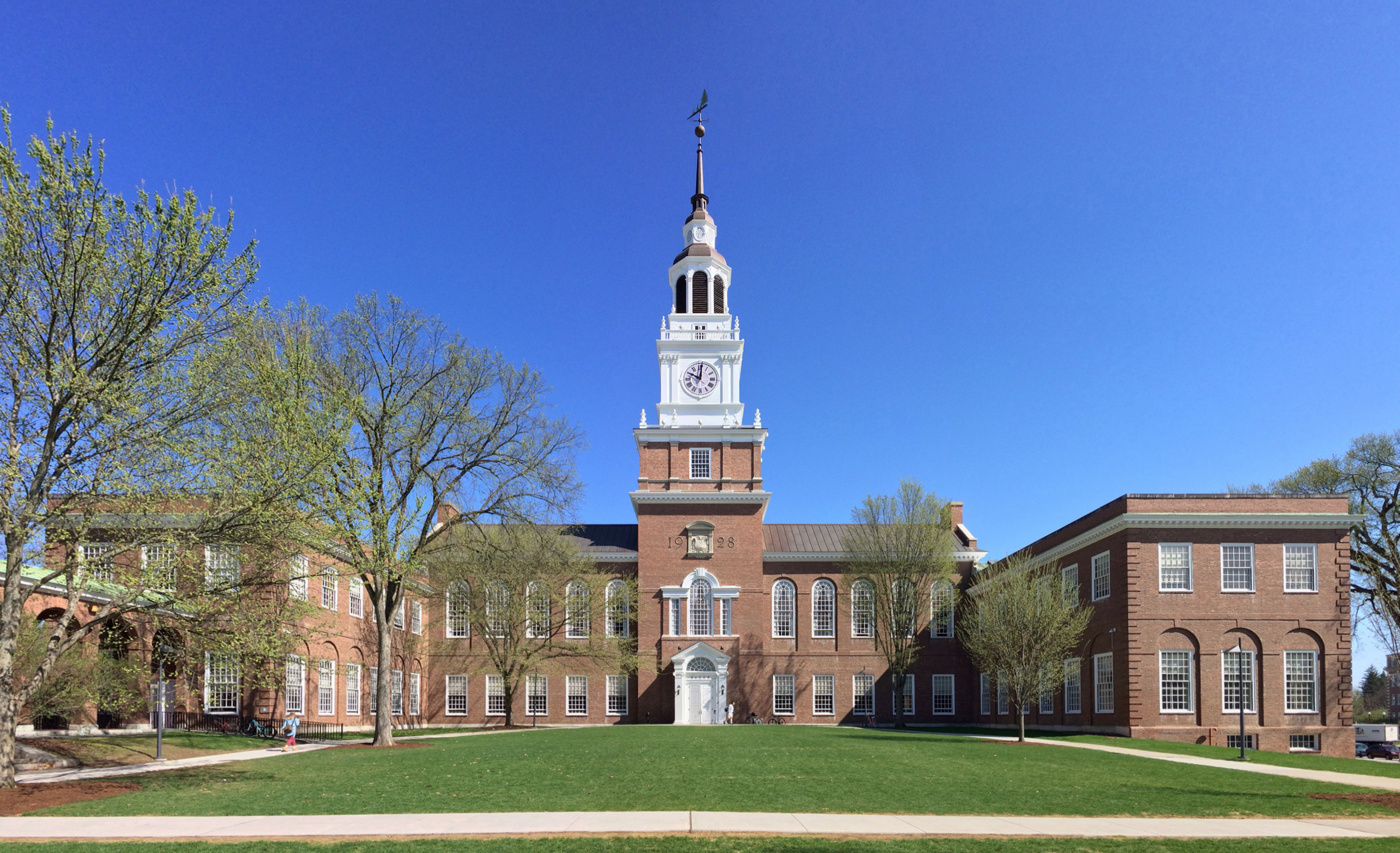 Fisher Ames Baker Memorial Library, Dartmouth College, Hanover, New Hampshire, 1928, Jens Frederick Larson (Larson & Wells)